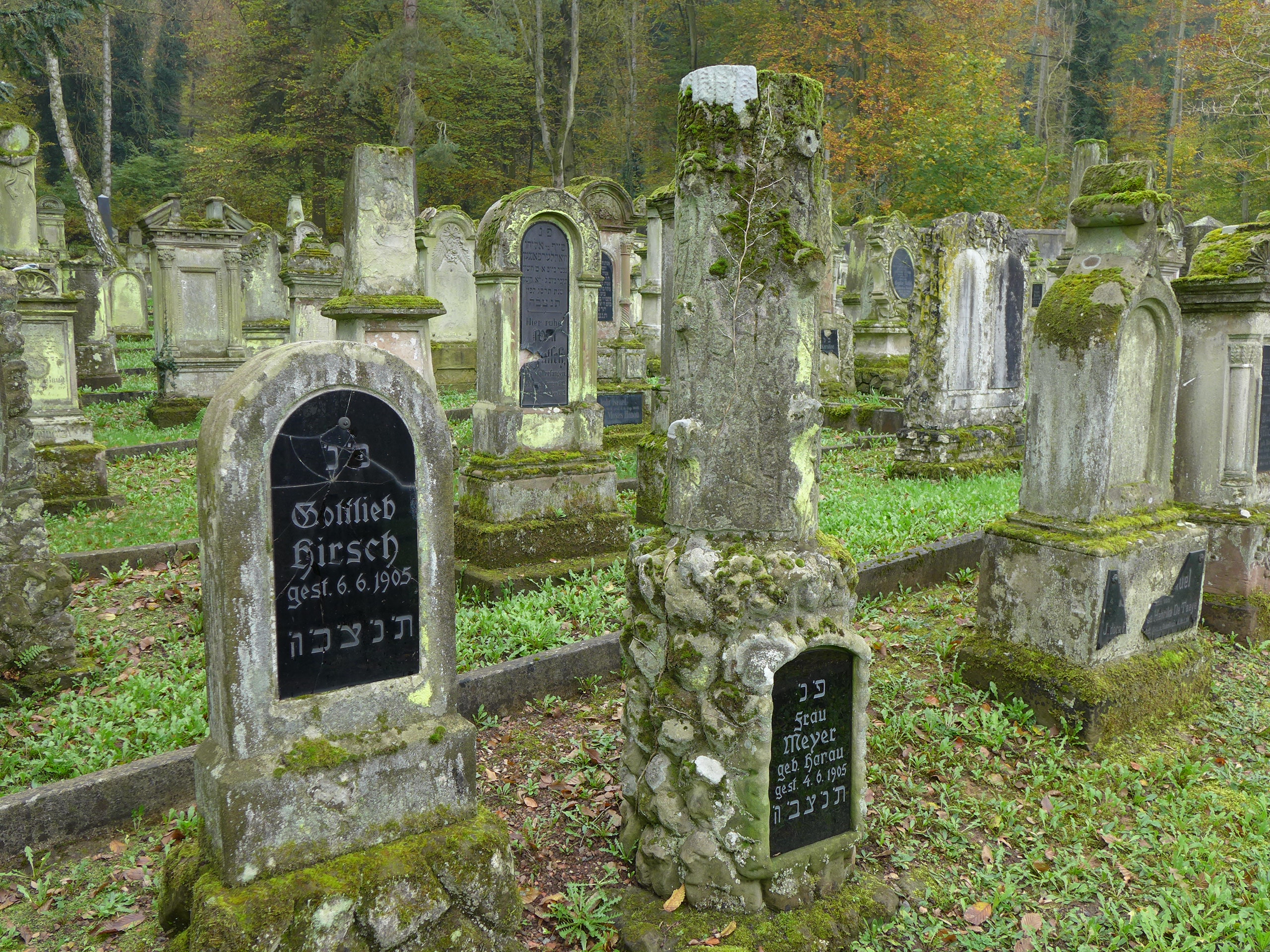 Diefflen, Jüdischer Friedhof